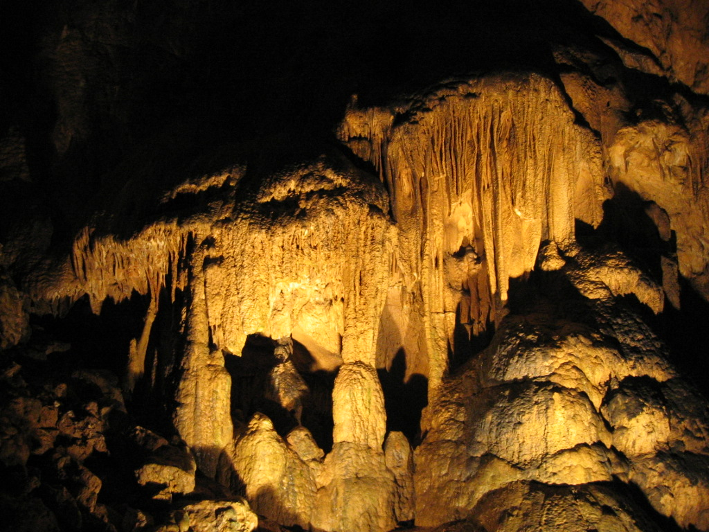 Grotte d'Ossellle - Doubs - Franche-Comte - France